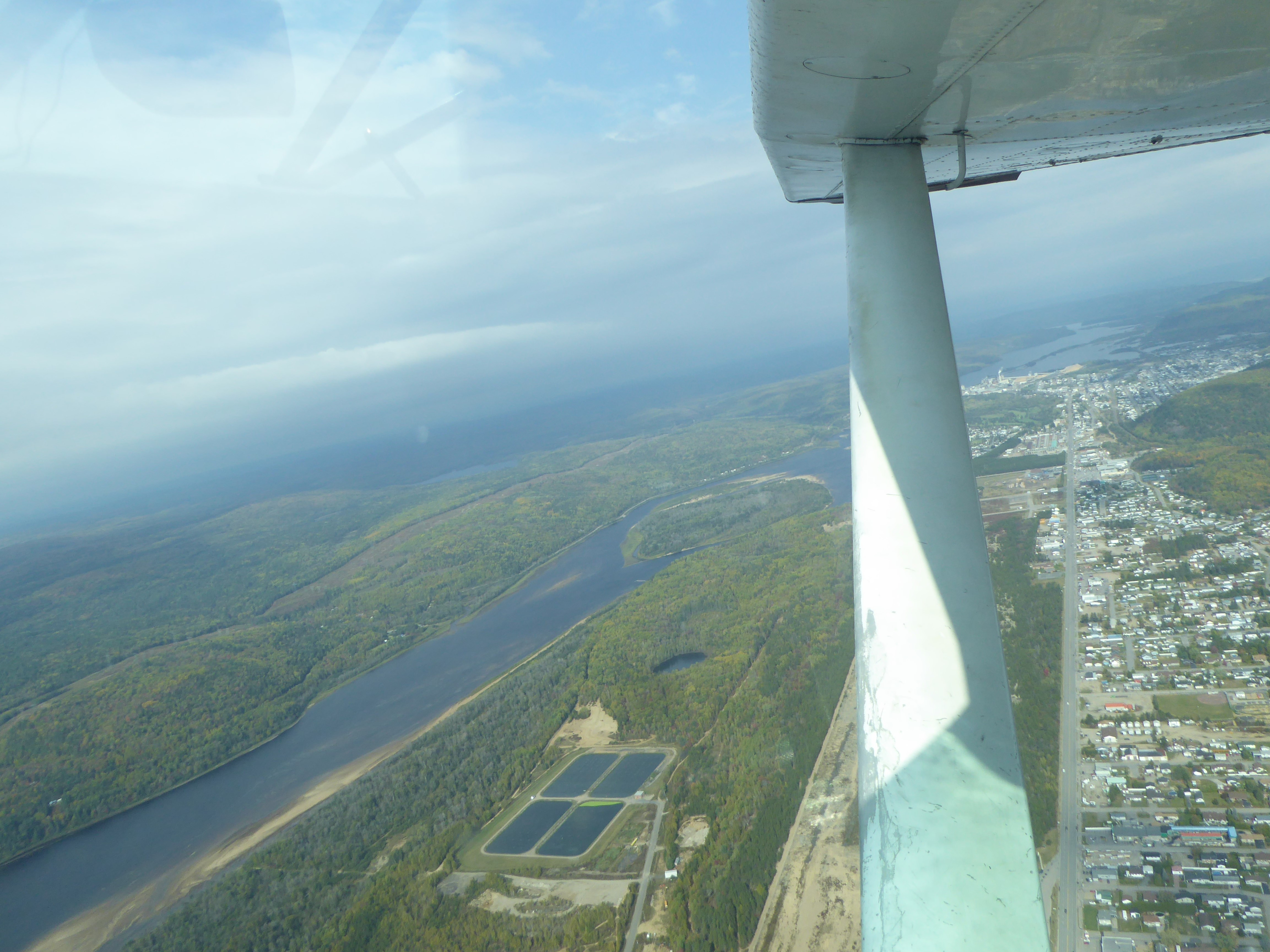 Suvol en hydravion de la région de La Tuque Québec, Canada